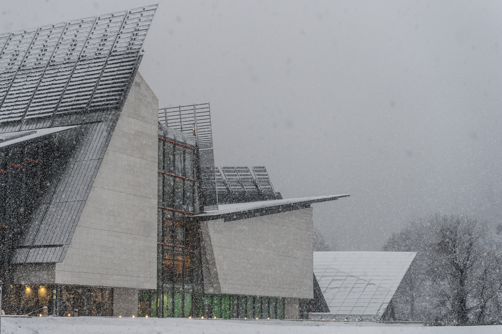 Il MUSE visto da nord-est durante una nevicata.